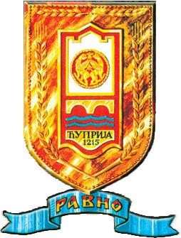 Coat of arms of Ćuprija/Blason de la ville de Ćuprija en Serbie